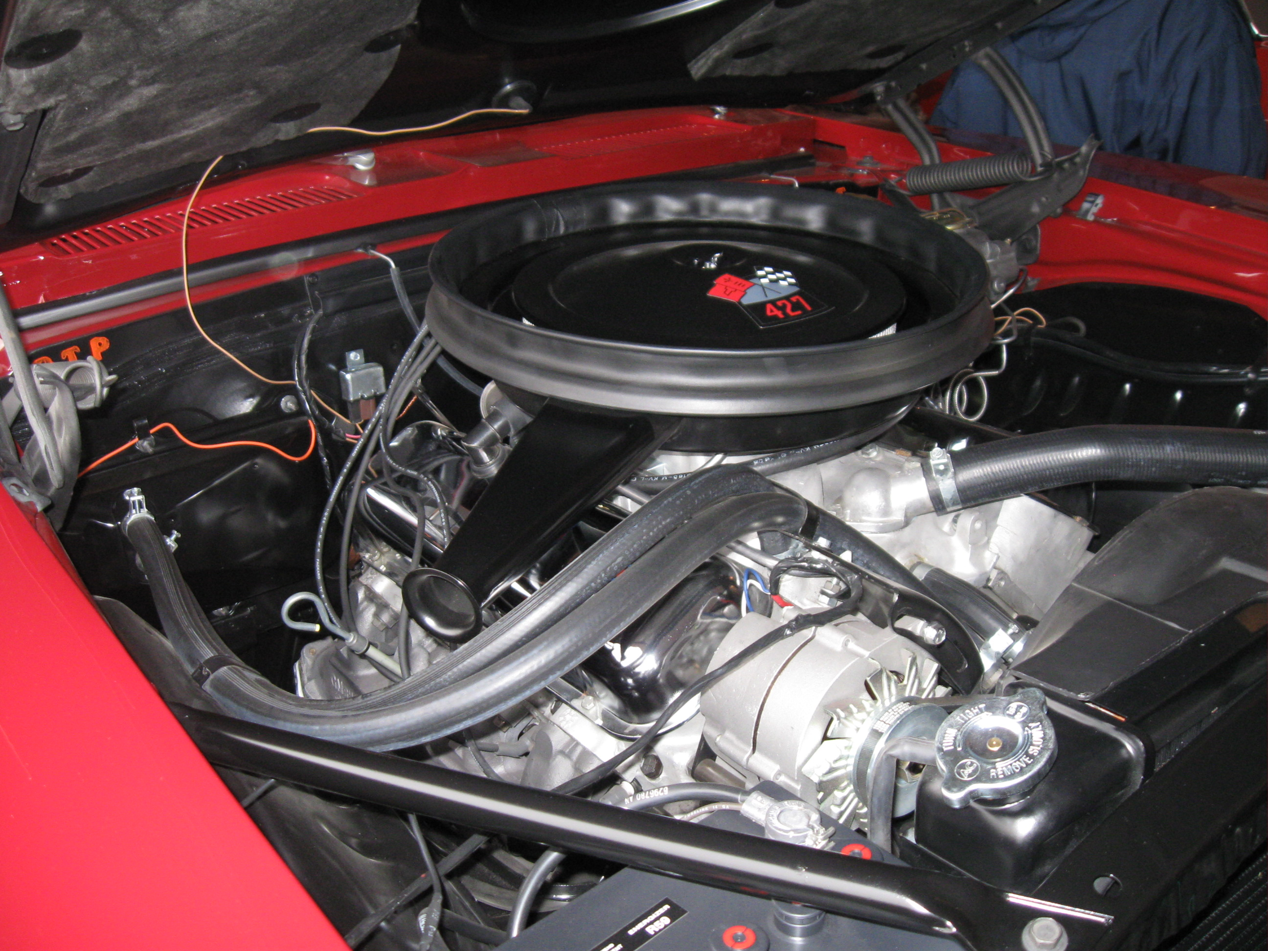 427 Aluminum in Camaro